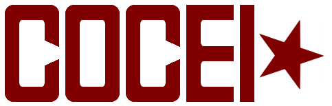 Logo of the Coalición Obrero Campesino Estudiantil del Istmo, from Juchitán, Oaxaca, Mexico. Made it using a photograph as example